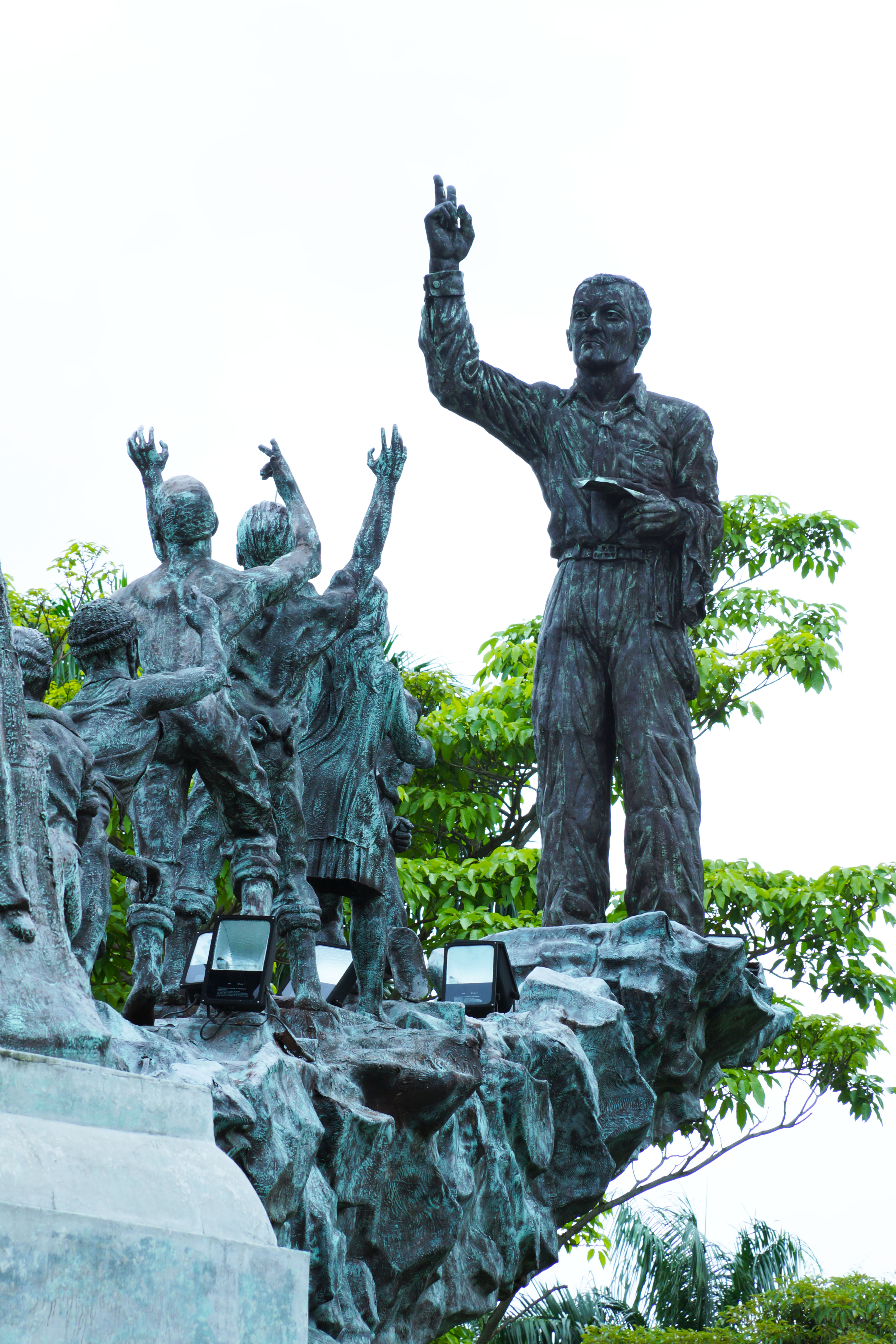 Este monumento se encuentra ubicado en la entrada de la calzada de amador es considerado monumento “homenaje a la democracia” en honor a Arnulfo arias Madrid. Fue creado por Héctor Lombana. El monumento fue diseñado con elementos arquitectónicos, en su área central brota agua lo que es una fuente, también cuenta con “molduras pictóricas” que son componentes integrales del monumento.113 El monumento en memoria a Arnulfo Arias Madrid fue inaugurado el 15 de agosto de 2002 por la Presidenta de Panamá, Mireya Moscoso.